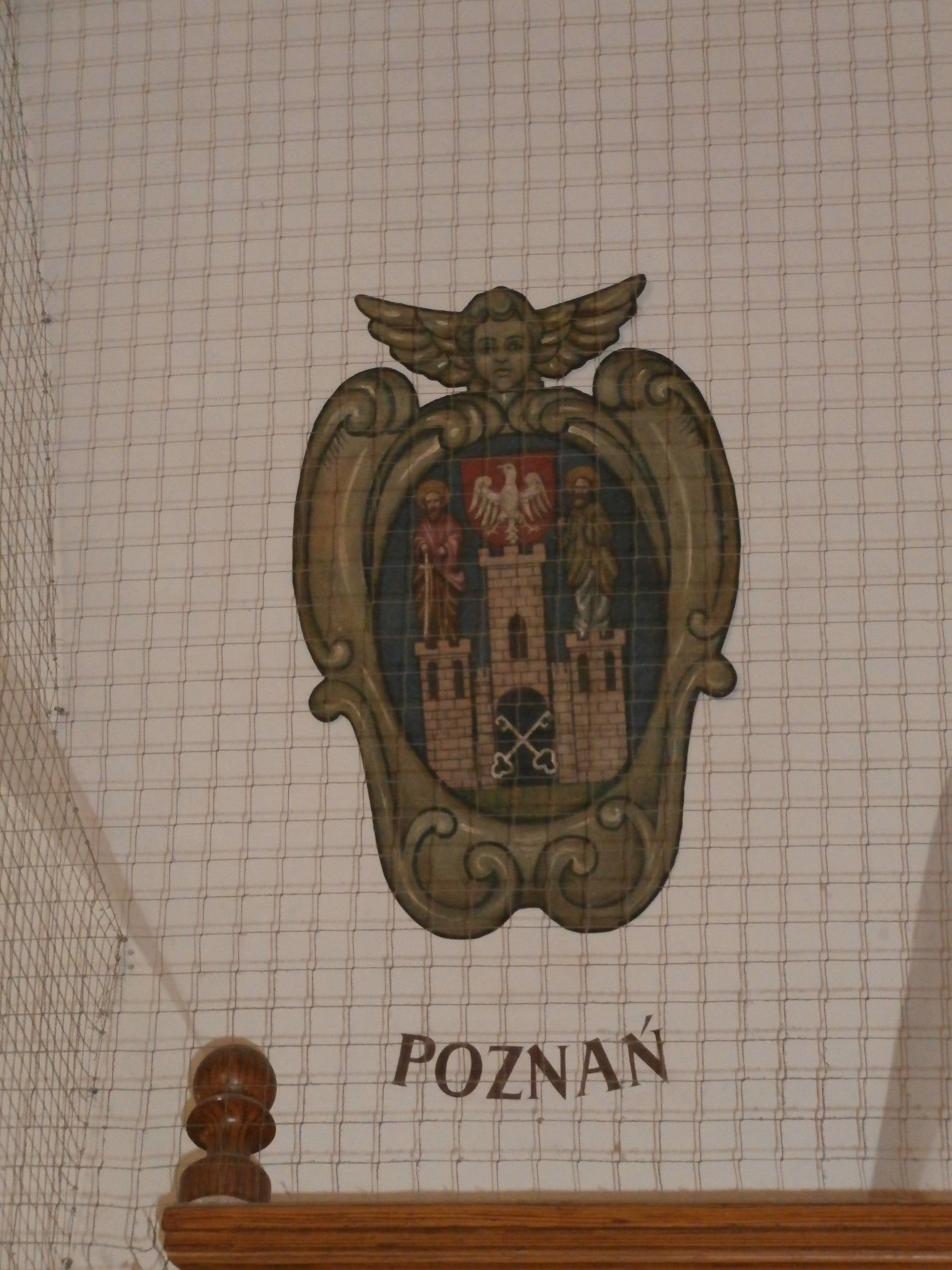 Herb Poznania we wnętrzu Krakowskich Sukiennic